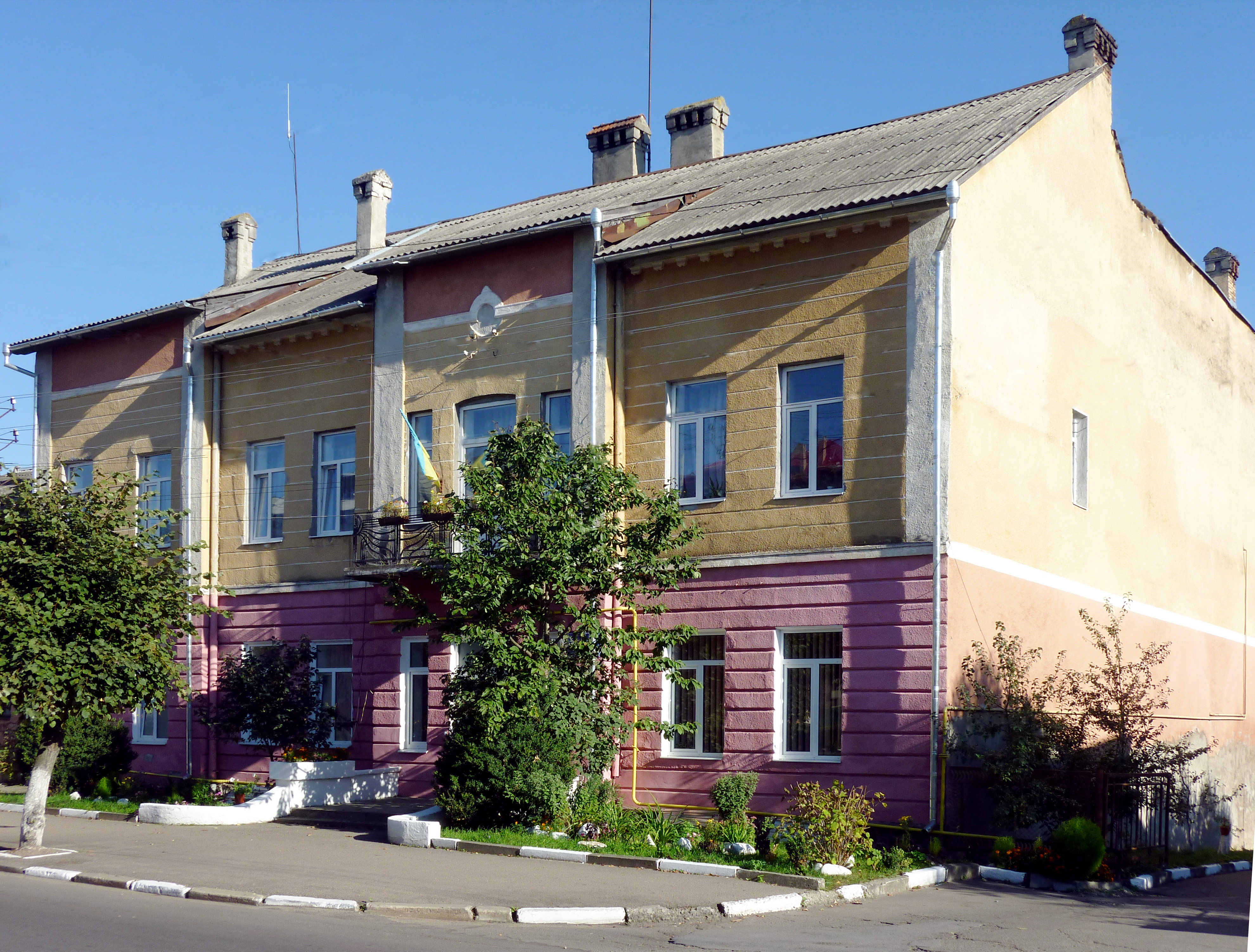 Станція швидкої медичної допомоги